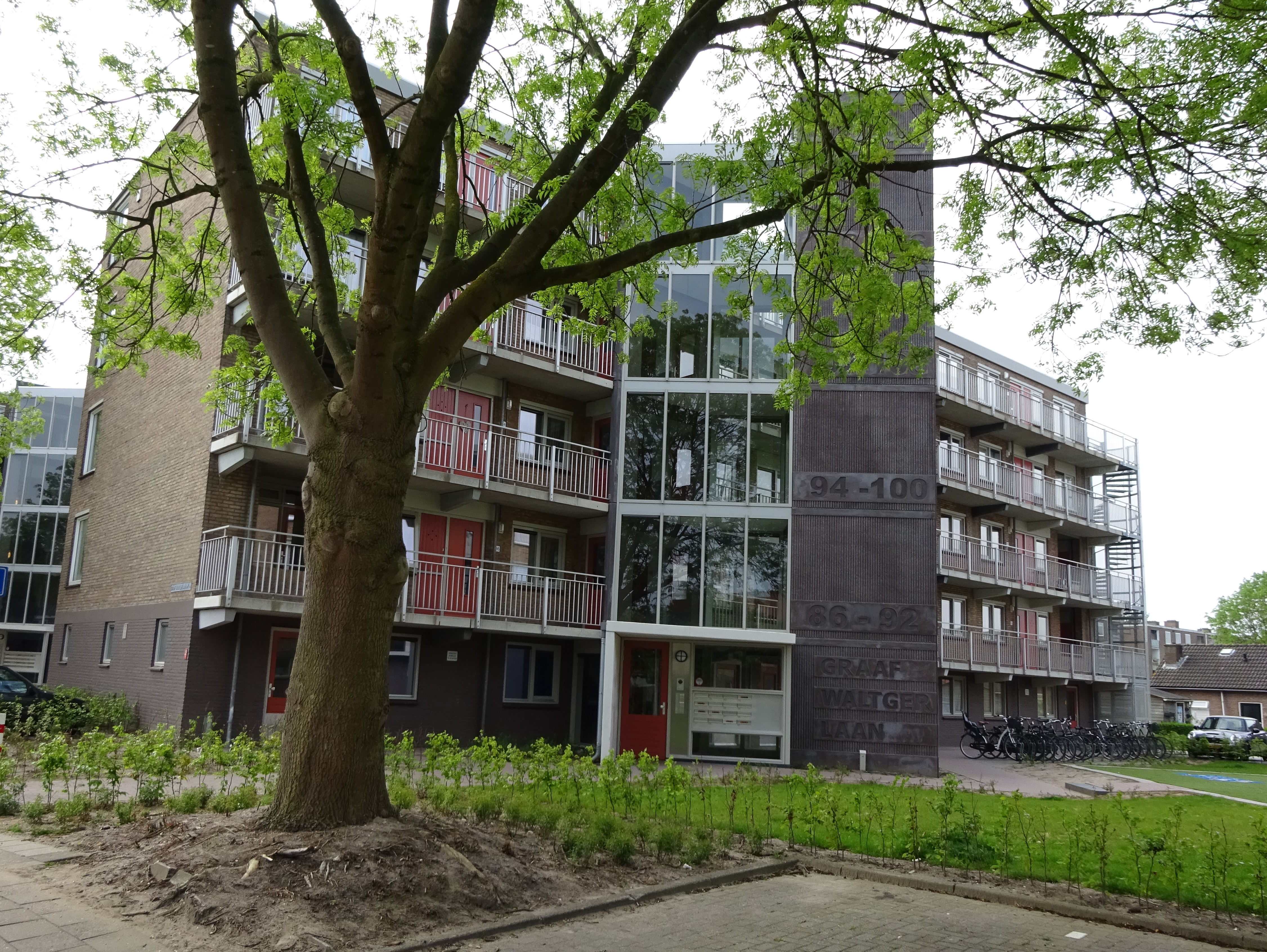 Gerenoveerde galerijflats Graaf Waltgerlaan in de Hertogenwijk